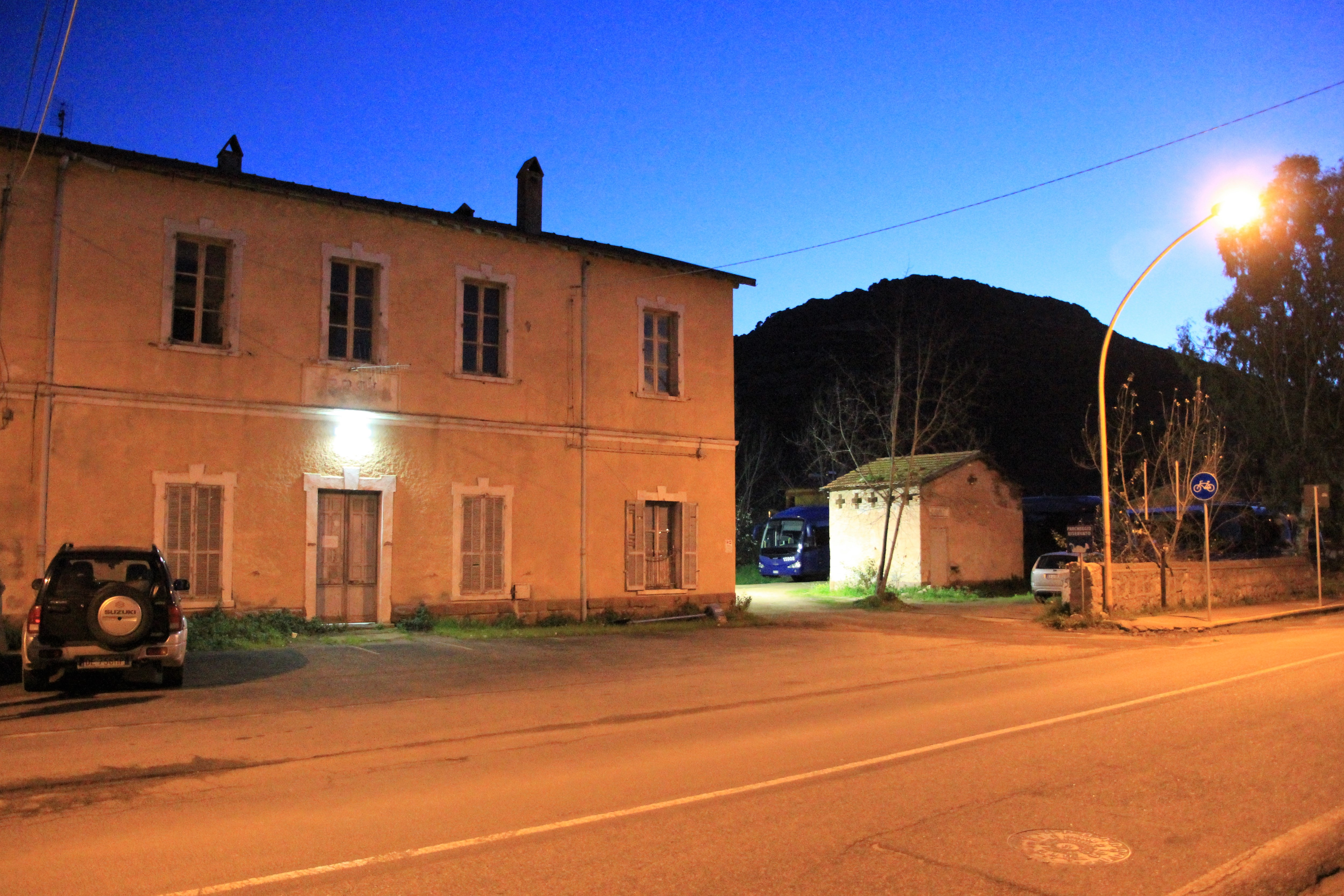 Bosa, stazione ferroviaria